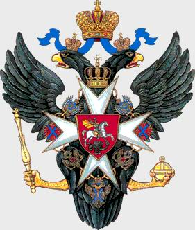 Гербовый орёл времён Павла I. 1796